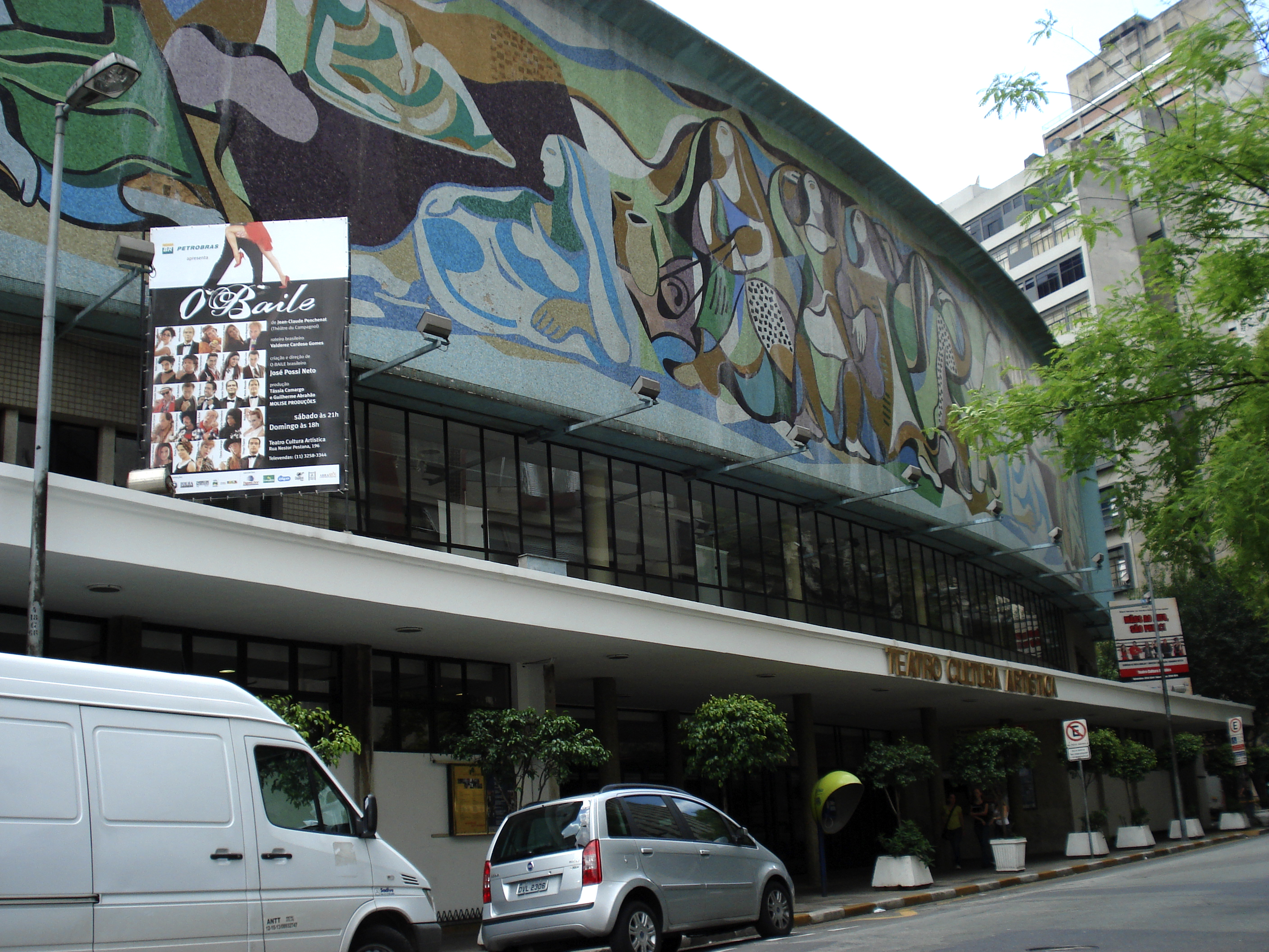 Fachada antes do incêndio do Teatro Cultura Artística, em São Paulo (SP), Brasil